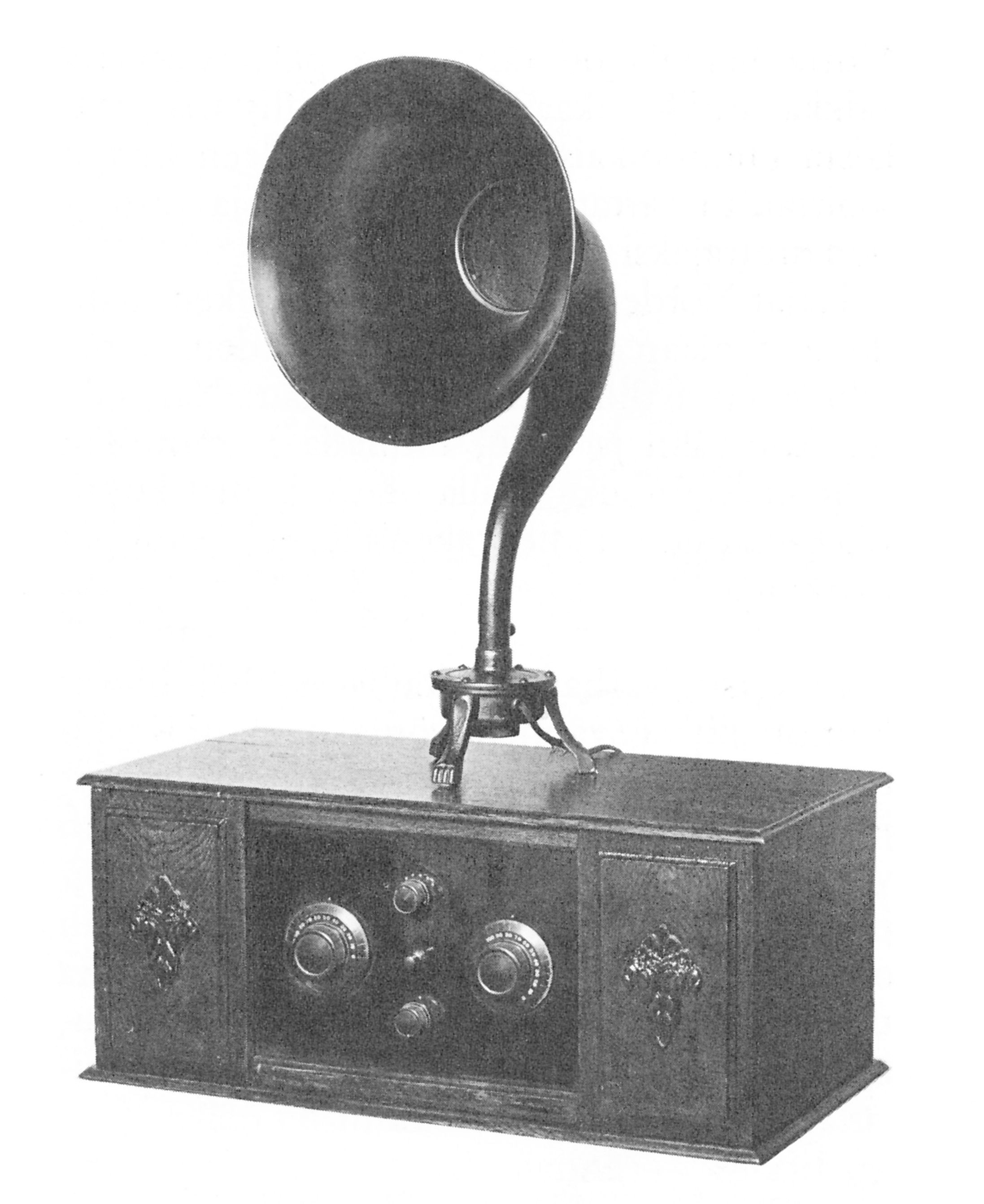 Salora Sissi A 3 putkiradio